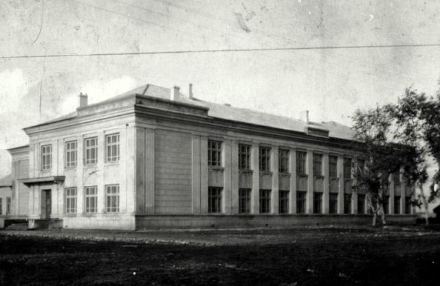 Кораблинская школа №1 (1940 год)